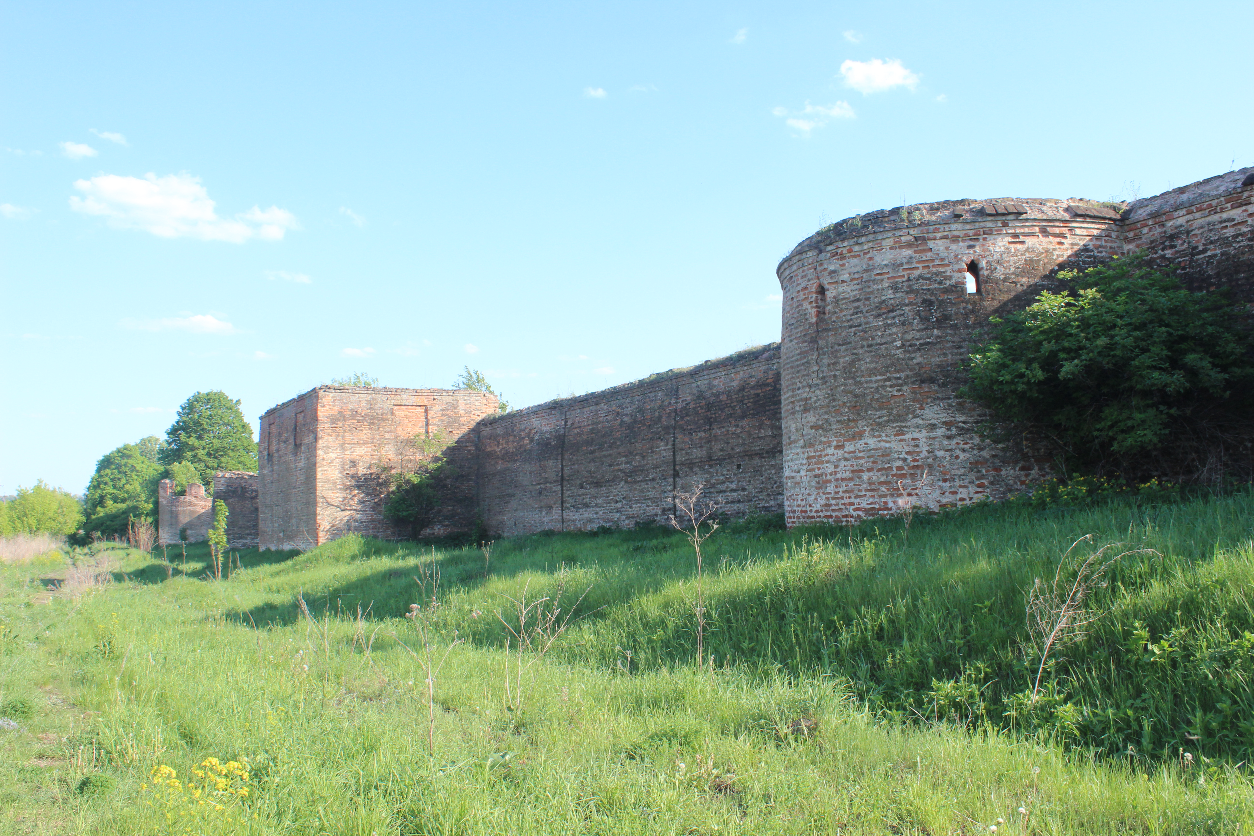 Ограда с башнями и двумя пирамидальными ледниками: Сабурово, Орловский район, Орловская область